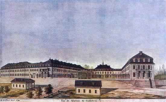 "Vue du Château de Carlsberg" - Ansicht von Schloss Karlsberg (Homburg)